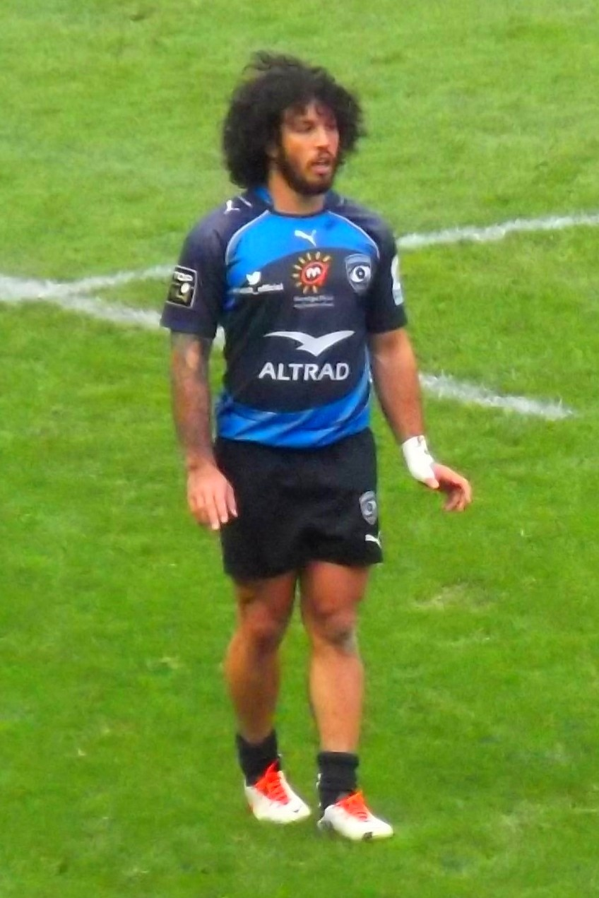 René Ranger, MHR vs Castres.